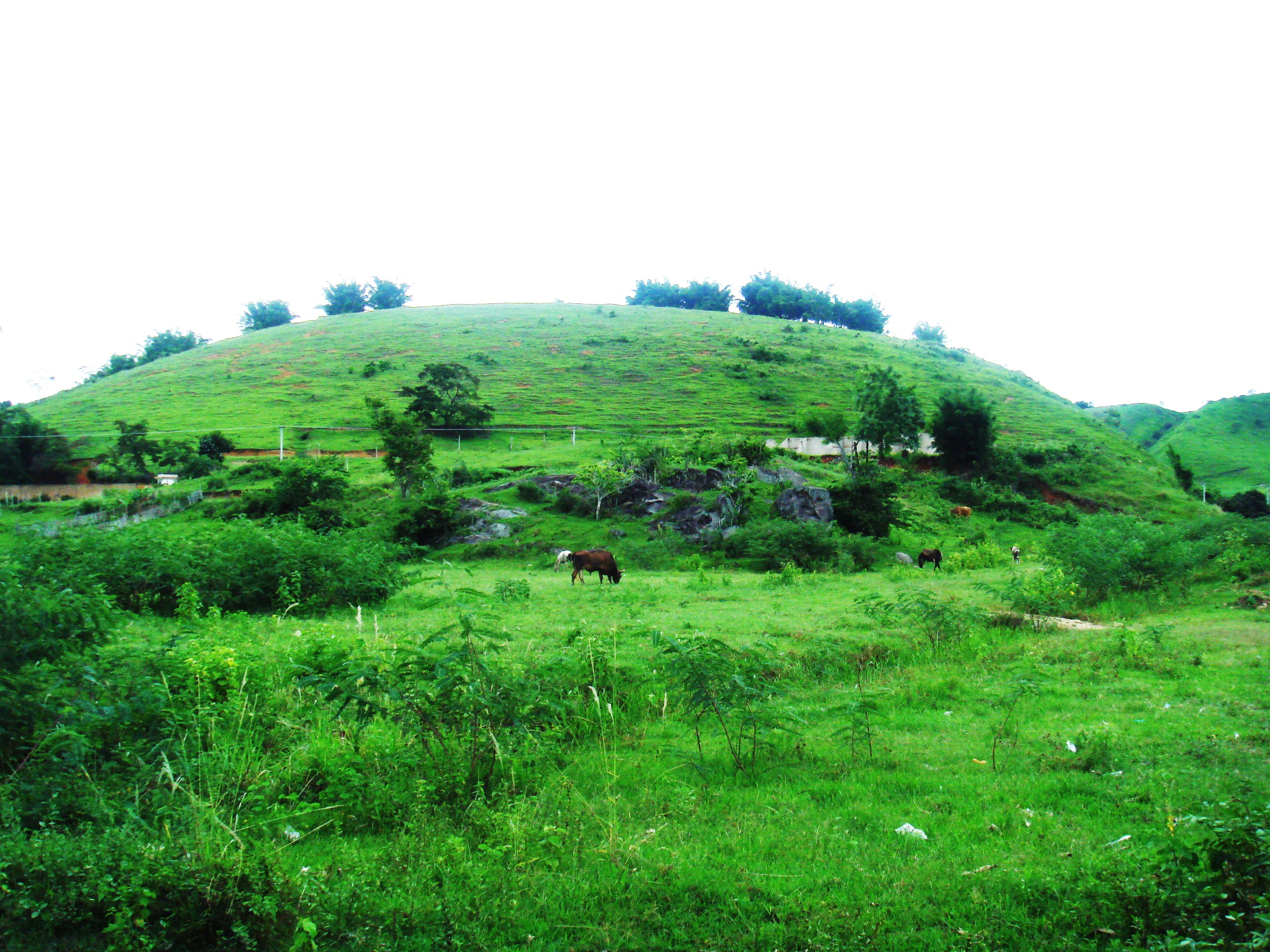 Sítio Itatiba